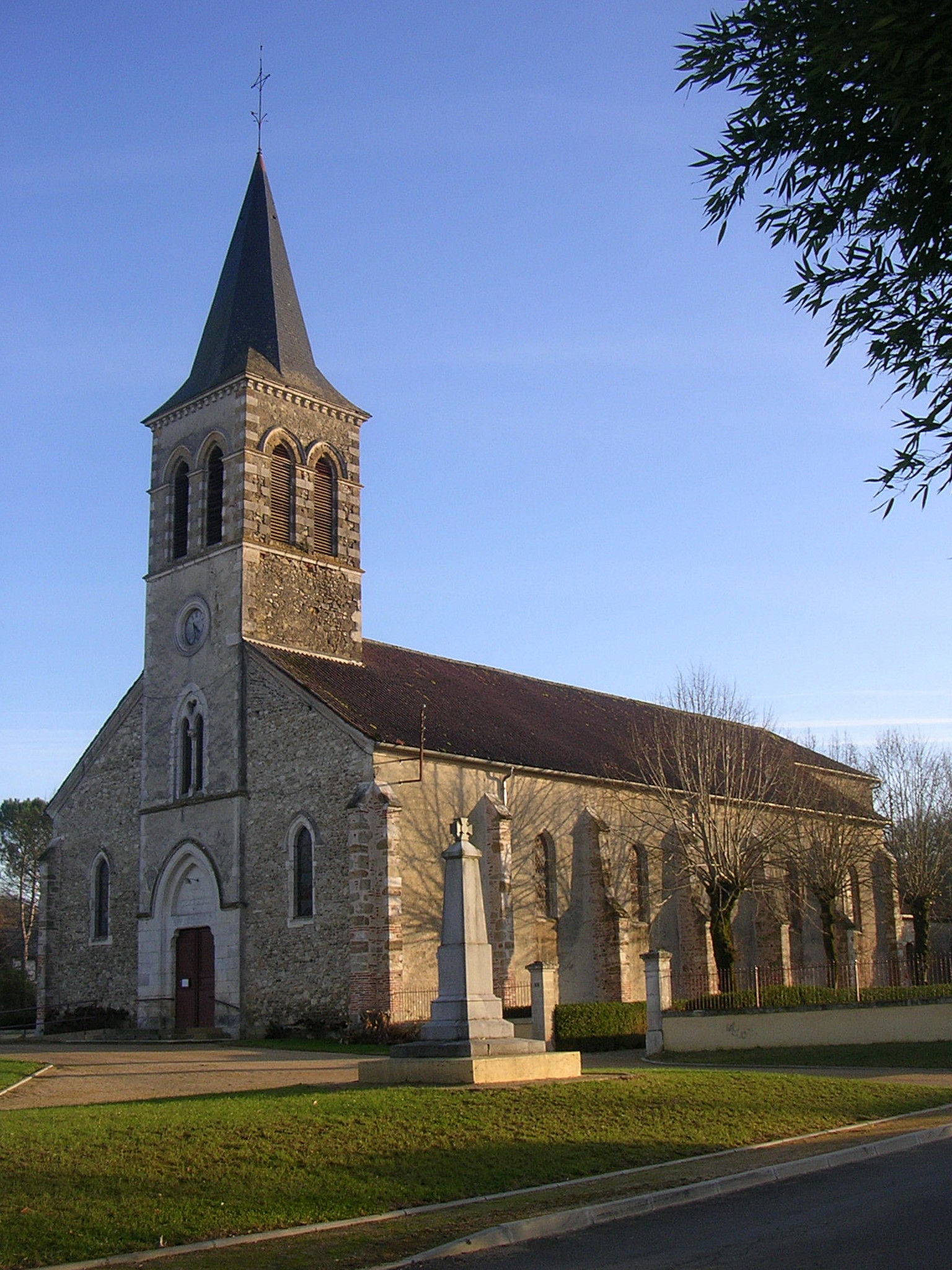 Eglise de Larrivière, à Larrivière-Saint-Savin (Landes, France)